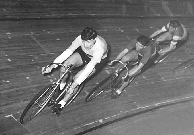 Konrad Nentwig, Harry Seidel Zentralbild Bey-Wen 24.1.1958 Winterbahn-Premiere der Radamateure In der Berliner Werner Seelenbinder-Halle fand am Donnerstag, dem 23.1.1958, die winterbahn-Premiere der Radamateure statt. UBz: Während eines 30-Runden-Punktefahrens um den "Großen Preis der Berliner Zeitung".Der spätere Sieger Konrad Nentwig (Post Berlin) führt vor dem Zweitplazierten Harry Seidel (Semper Berlin).